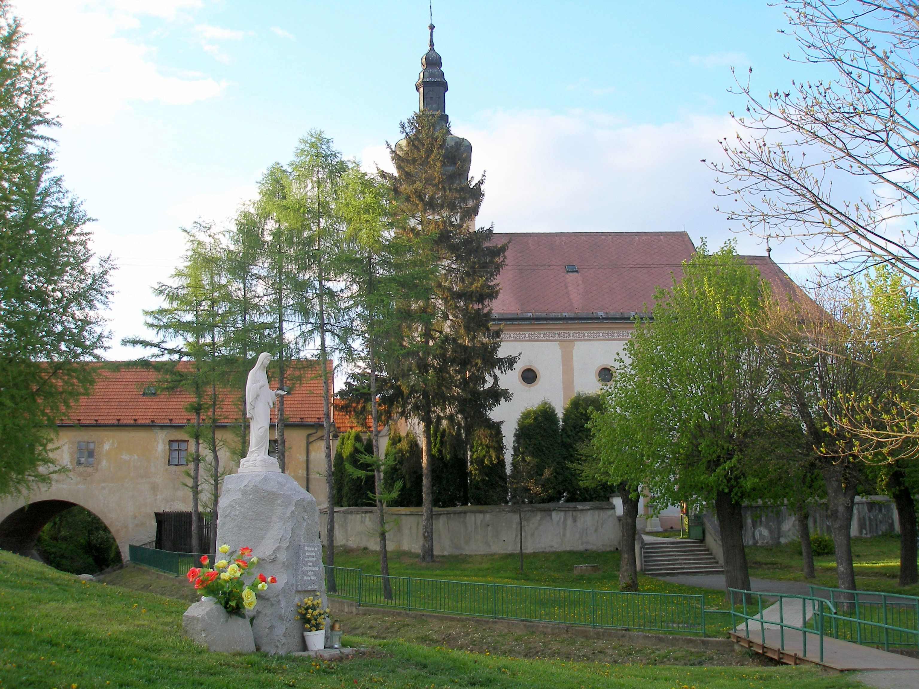 Obec Fintice okres Prešov región Šariš